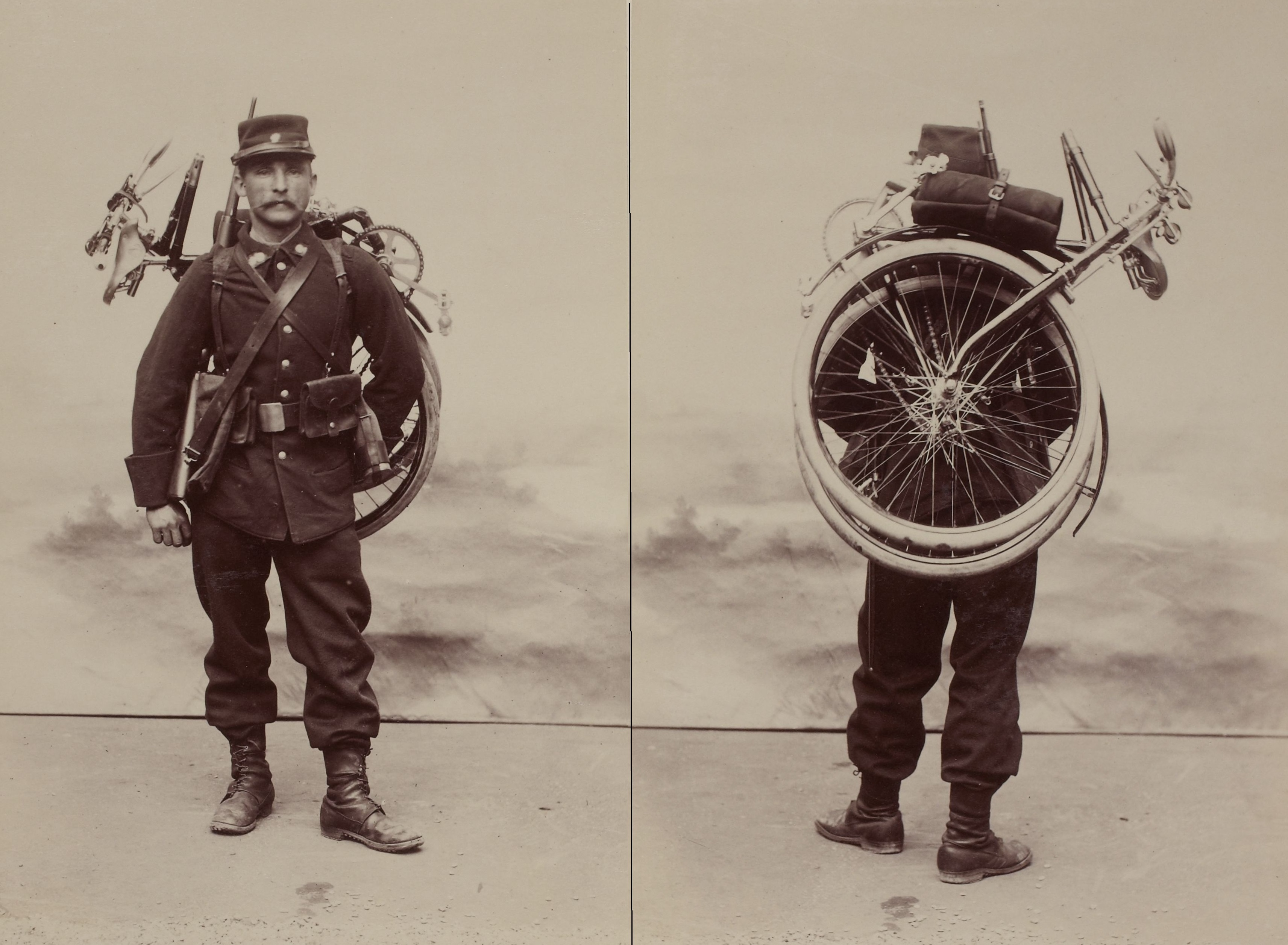 [Collection Jules Beau. Photographie sportive] : T. 3. Année 1896 / Jules Beau : F. 25. [Bicyclette pliante Gladiator]